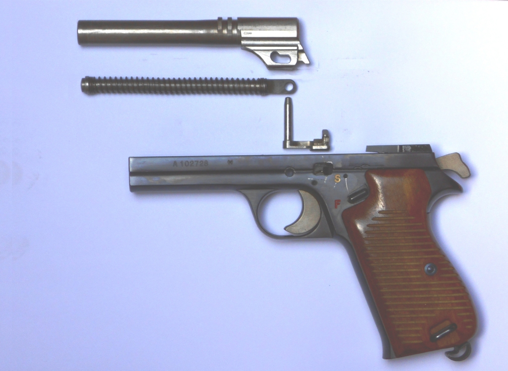 SIG Model 210 Teildemontiert